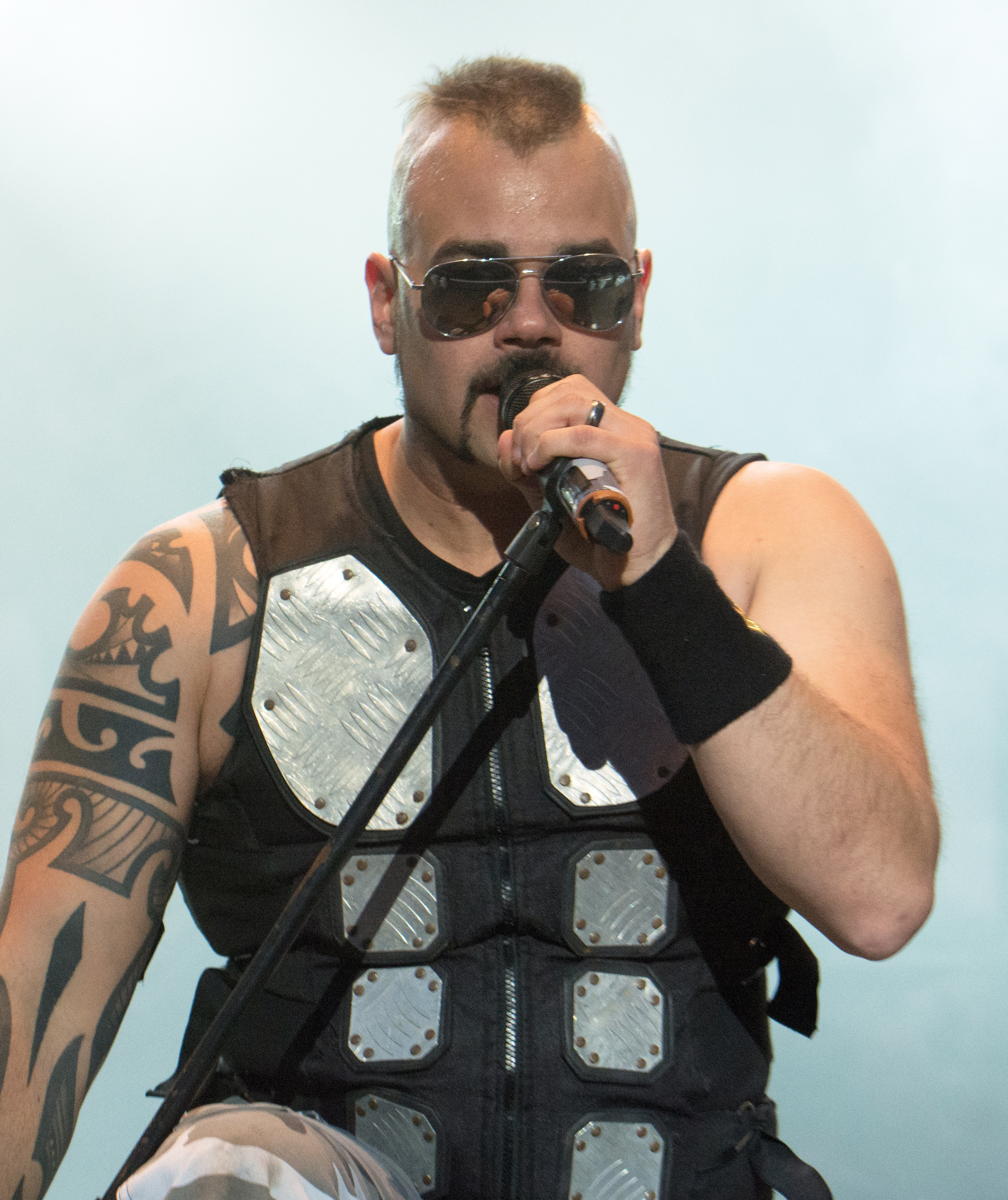 Sabaton beim Elbriot 2016